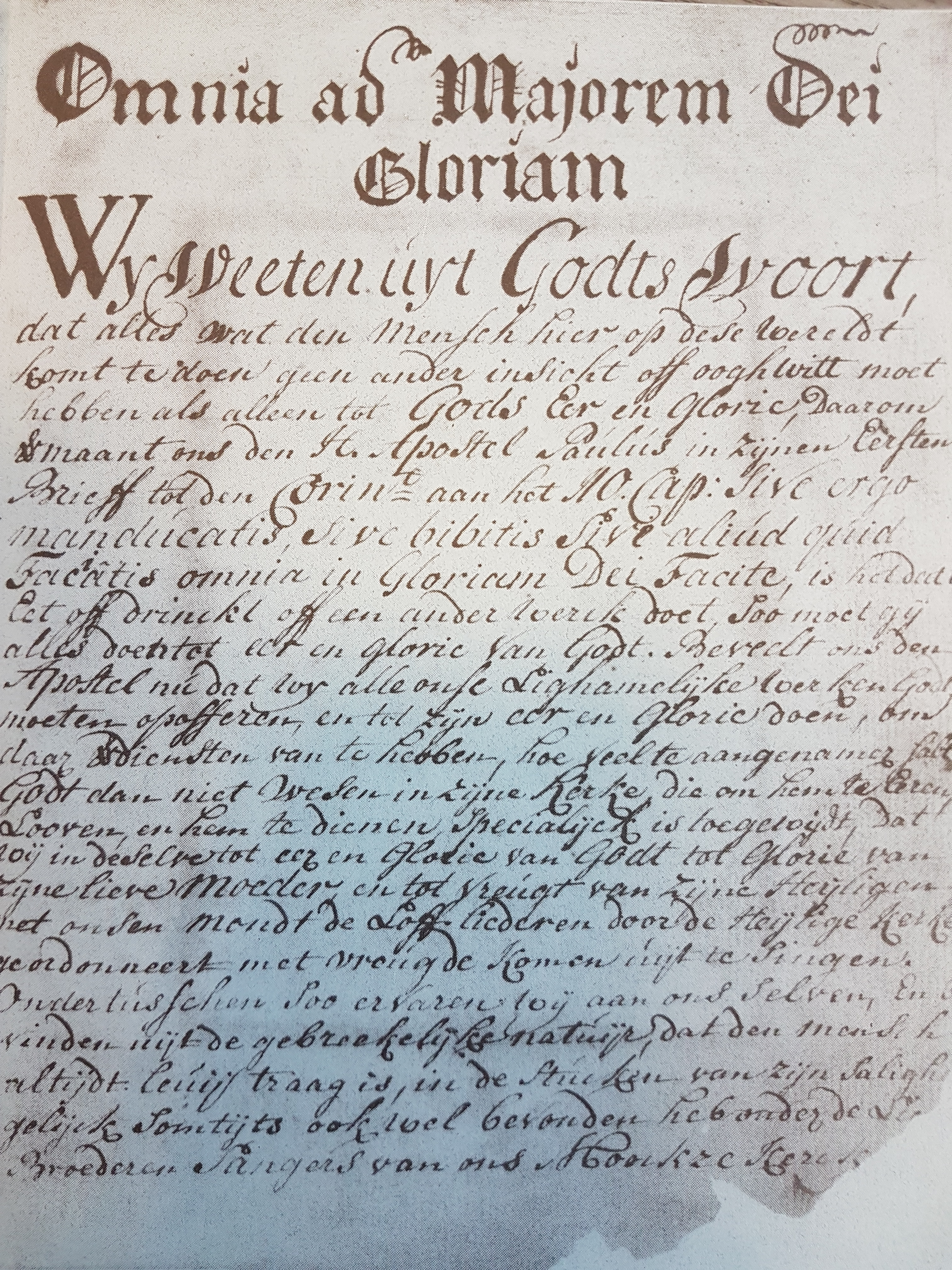 Origineel document van eerste vergadering Broederschap van de Sanghers historisch 1743